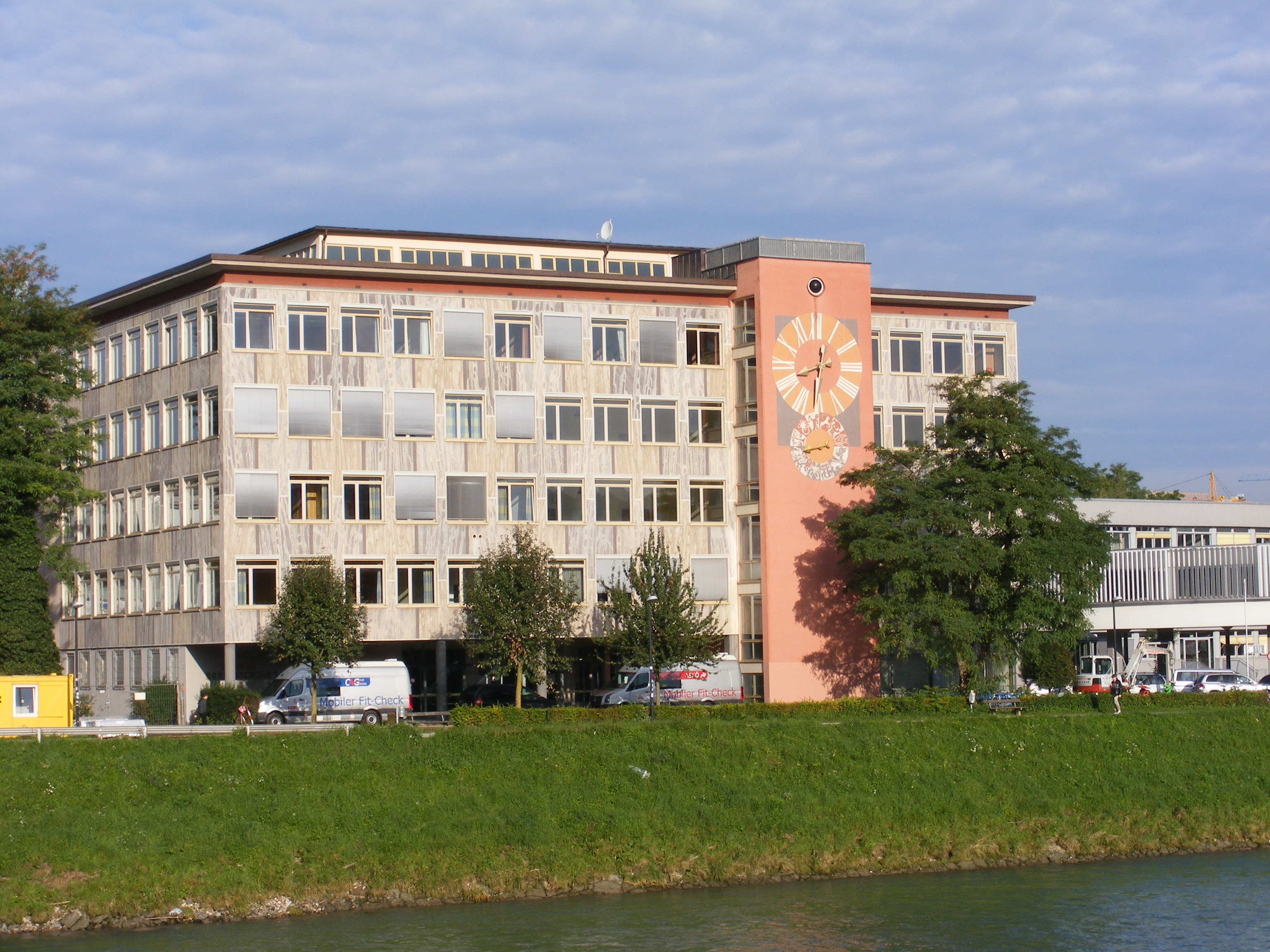 Makartsteg 3, Landesberufsschule Lehen. Rechts ein Stück der HAK-HASCH II, Salzburg